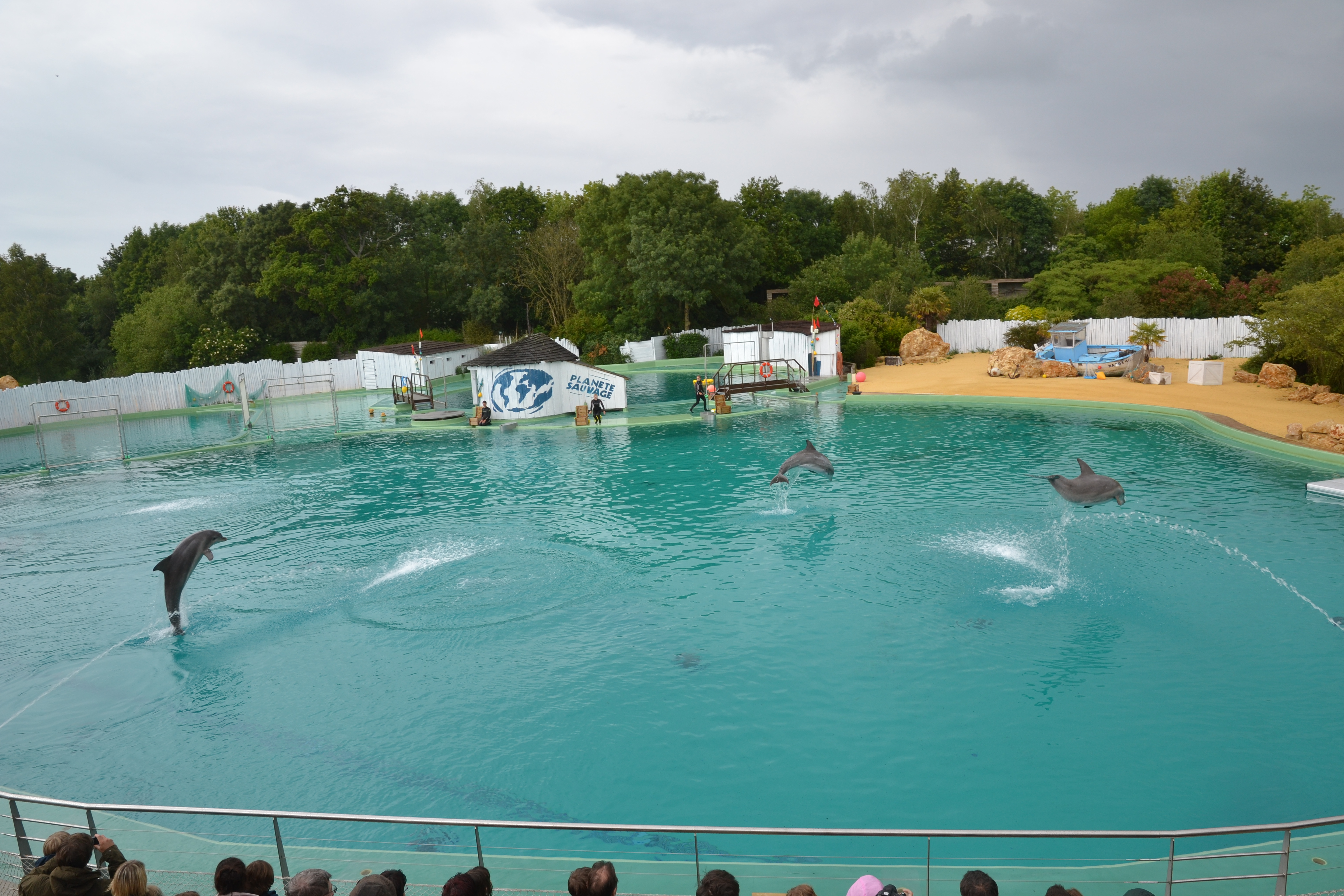 Dauphins Planète Sauvage